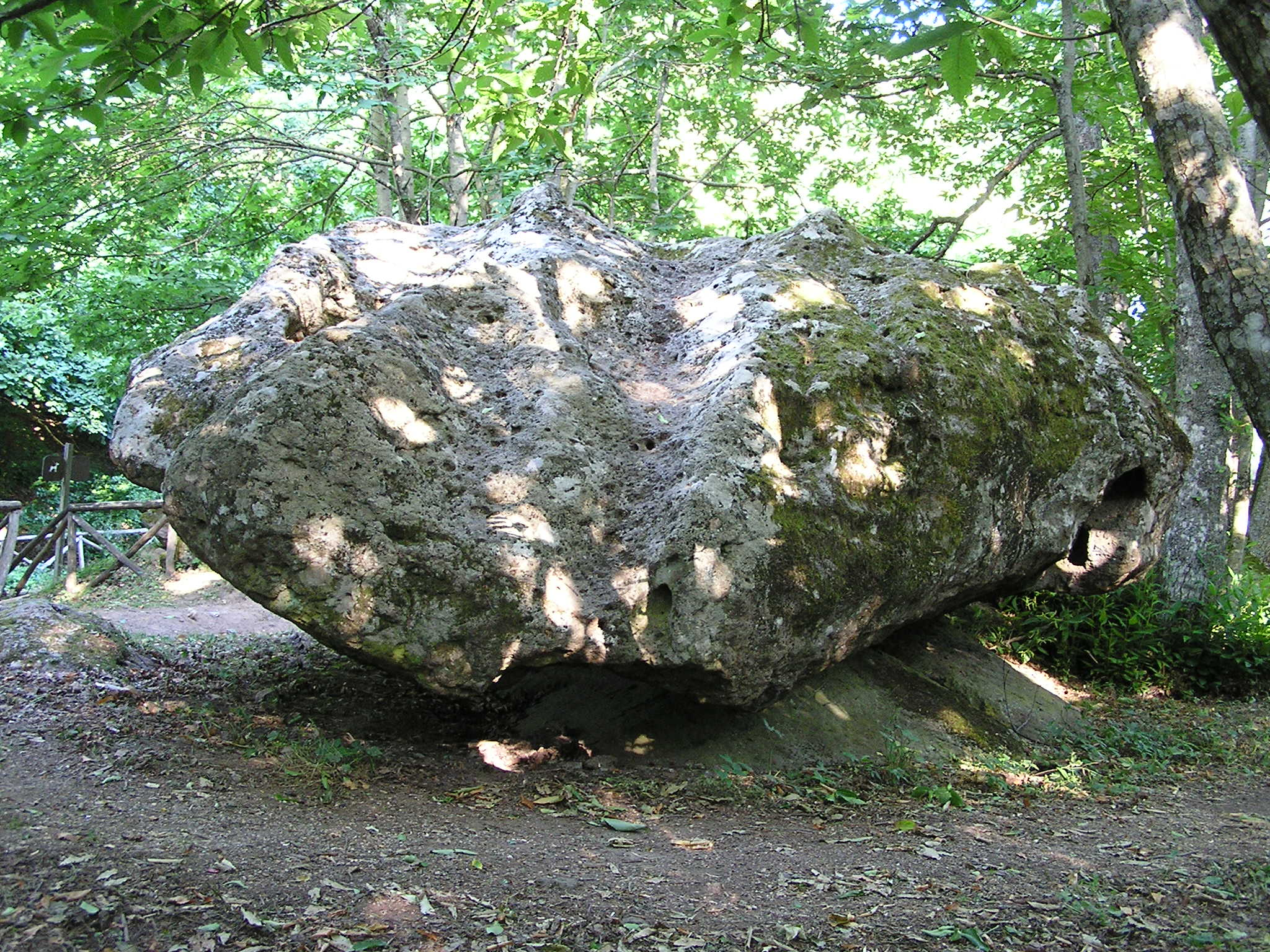 Orvieto, Monte Cimino, ca. 1000 m, Findling.